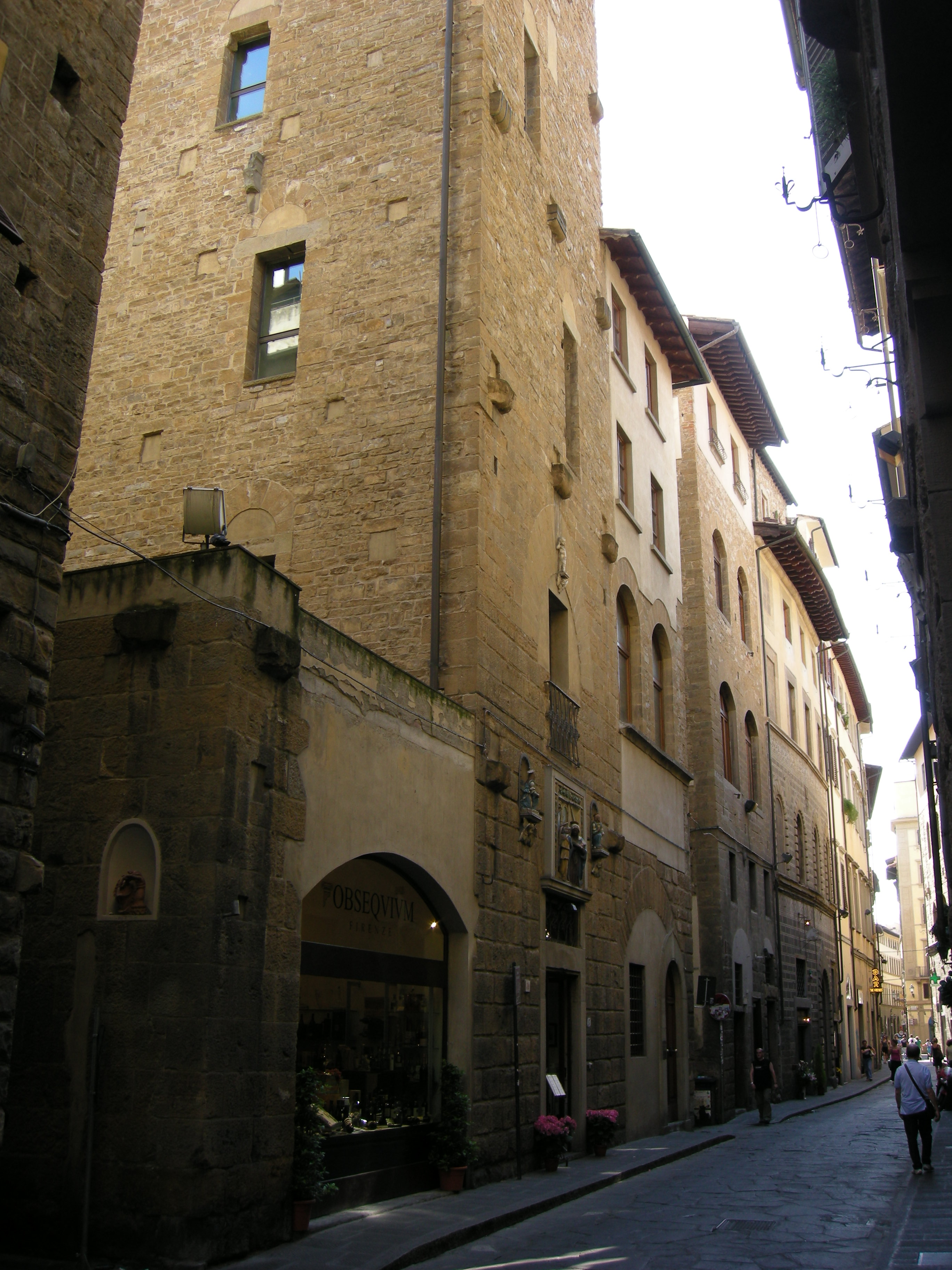 Torre dei marsili